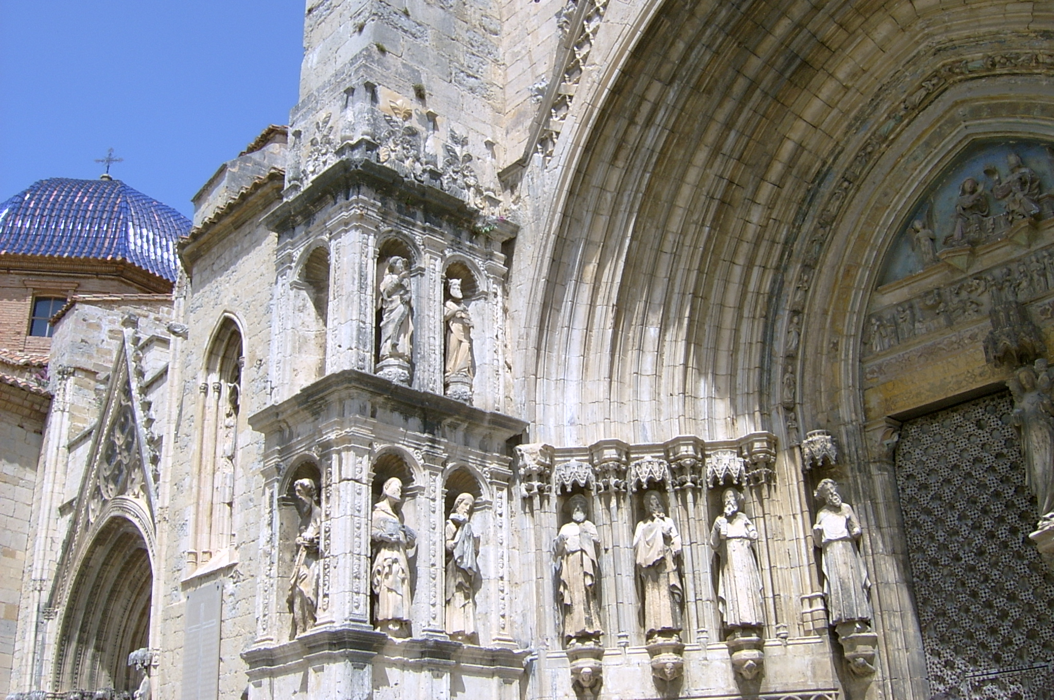 Puerta de la iglesia arciprestal de Morella